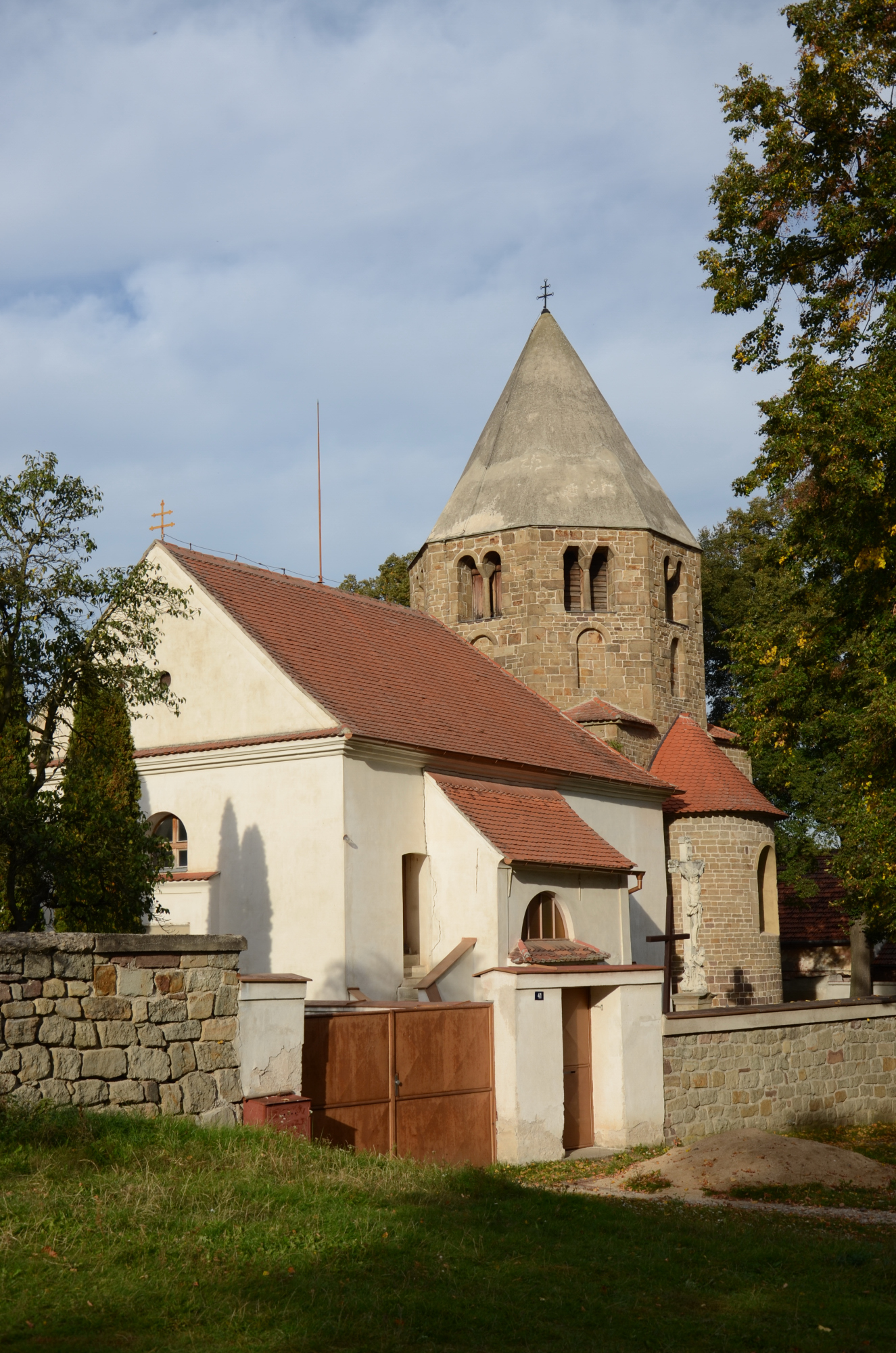 Kostel sv. Petra a Pavla (Řeznovice), Řeznovice